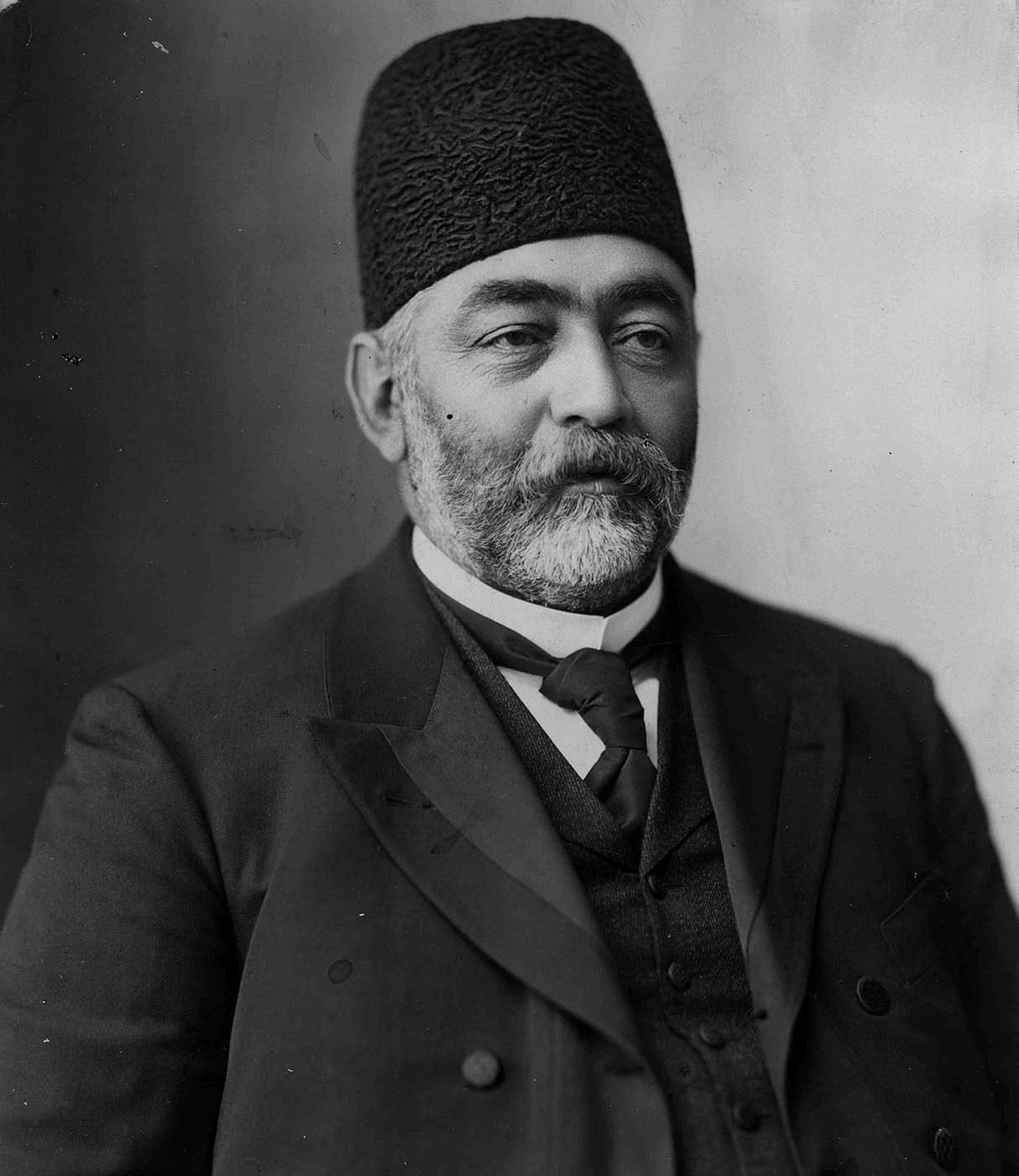 میرزا علی‌اصغر اتابک اولین رئیس‌الوزرای ایران